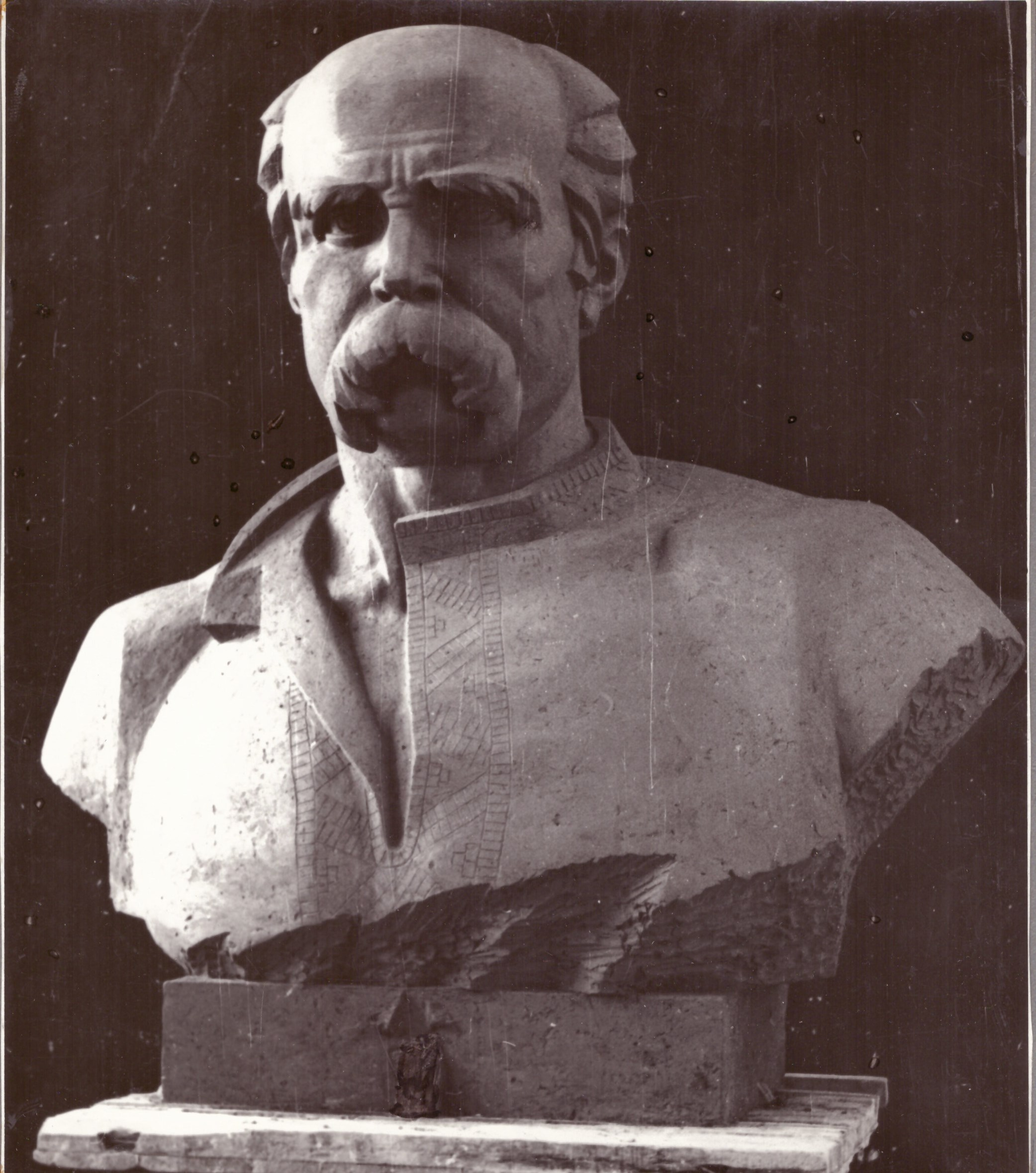 Пам’ятник Т.Г. Шевченку під час роботи. Штучний граніт, граніт. 1971. Скульптор Таранченко В.О.